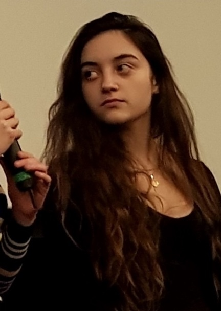 Luàna Bajrami lors d'une avant-première du film "L'Heure de la sortie" à Paris